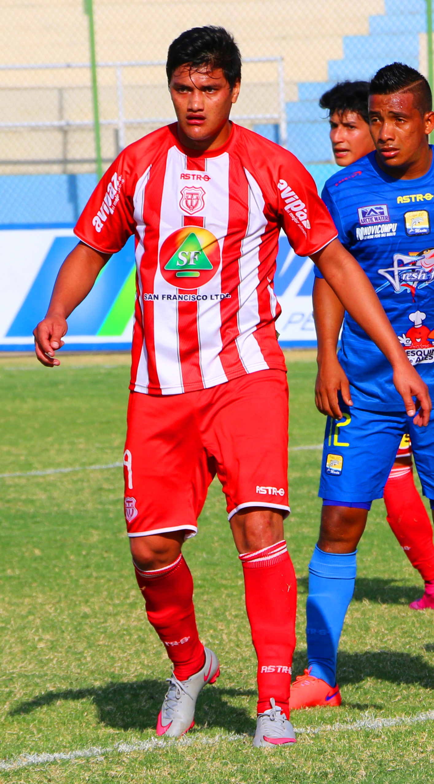 Héctor Penayo jugando en el Técnico Universitario 2015